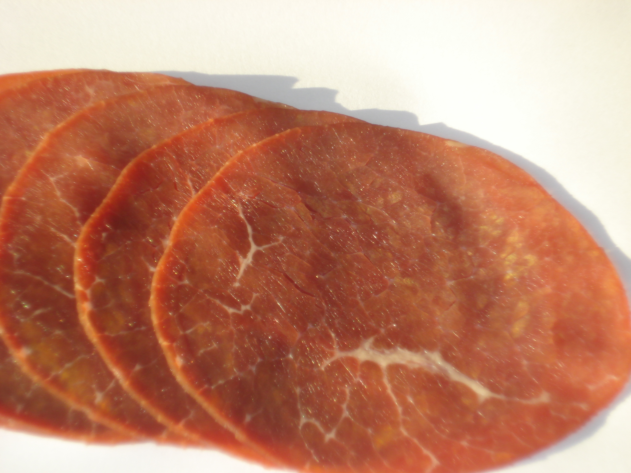 tranches de viande coupée